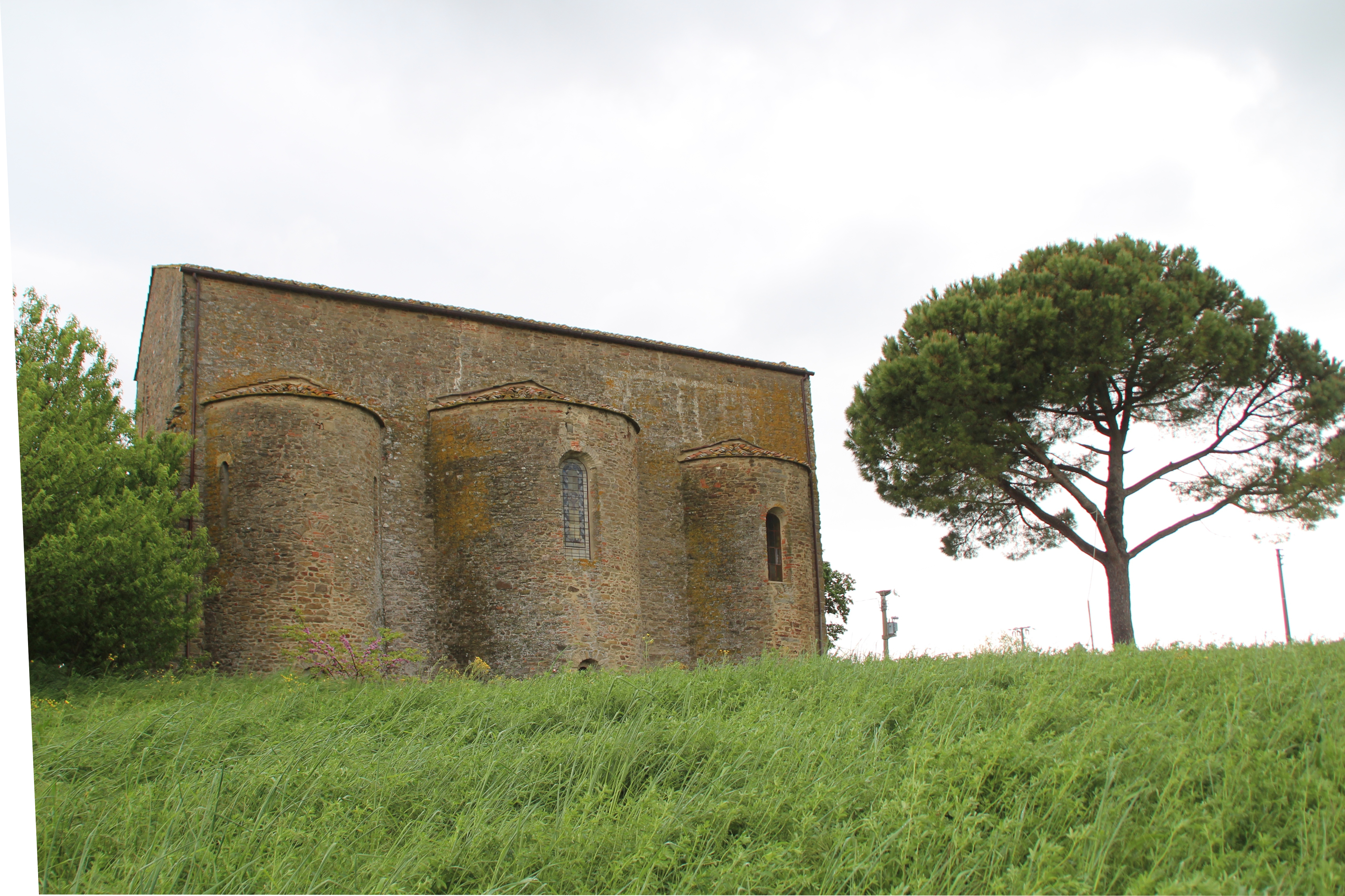 Abtei Farneta Anblick von Osten